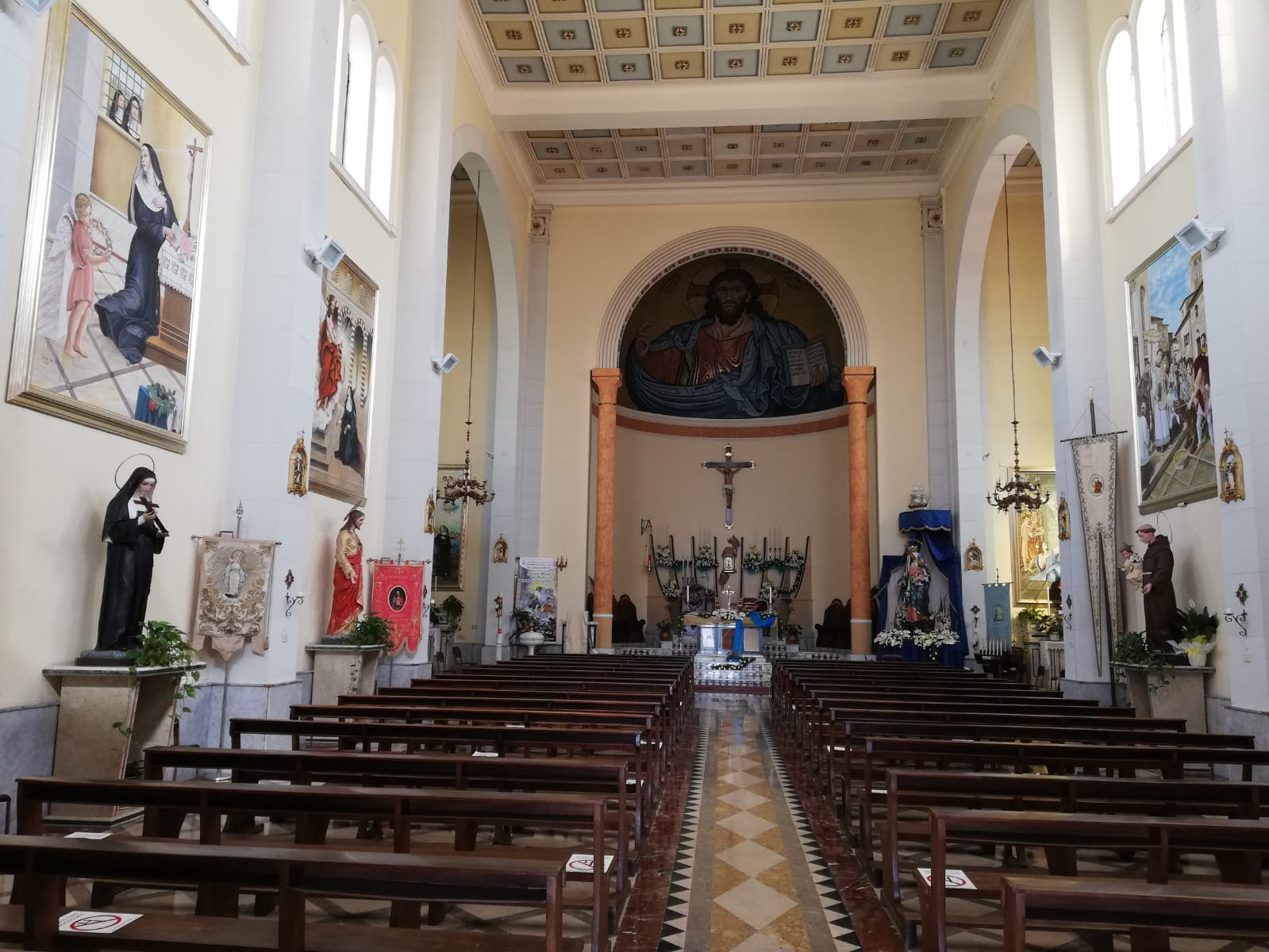 Interni chiesa di Portosalvo